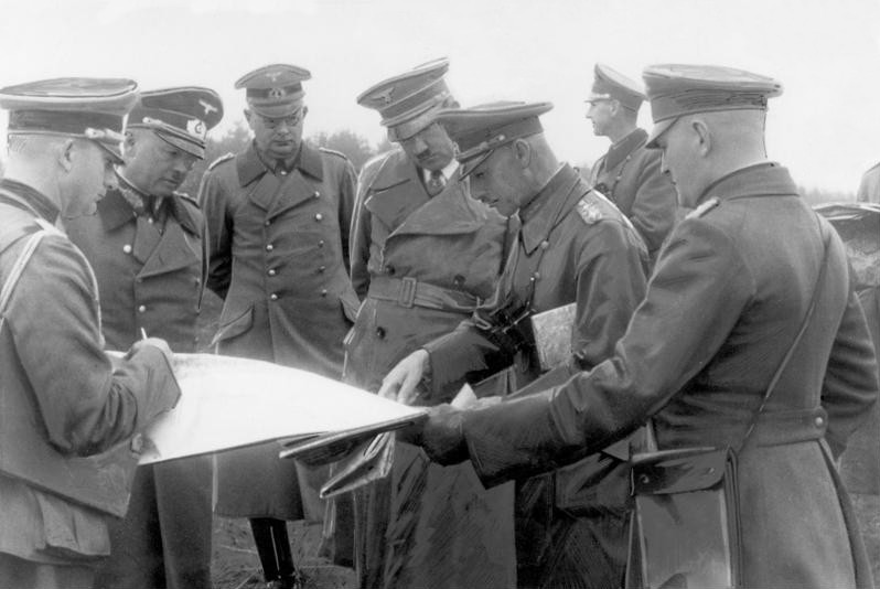 General der Artillerie Ritter v. Leeb, der Kommandeur f. Gruppenkommandeurs er erklärt dem Führer die Aufmarschbewegung